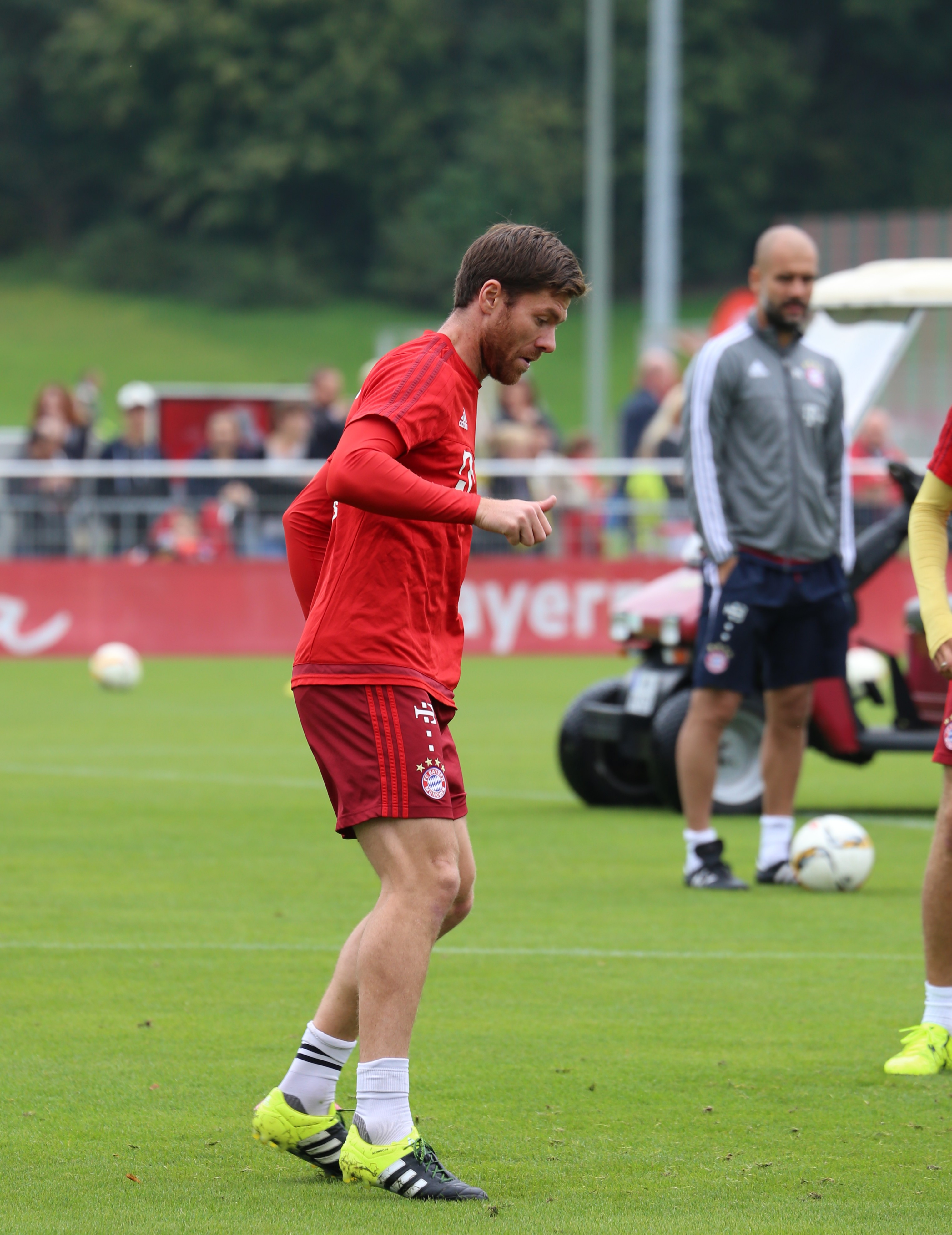 Xabi Alonso beim Training auf dem Gelände des FC Bayern München